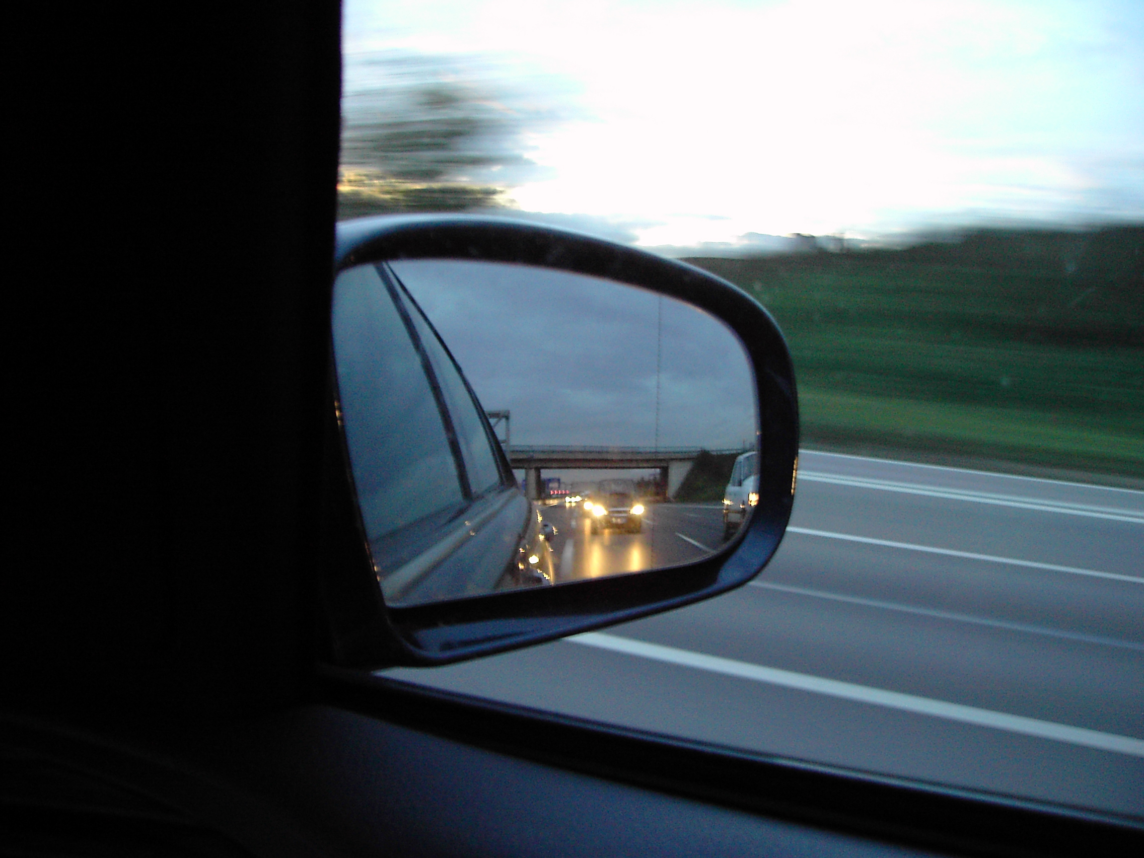 Rechter Außenspiegel Mercedes S